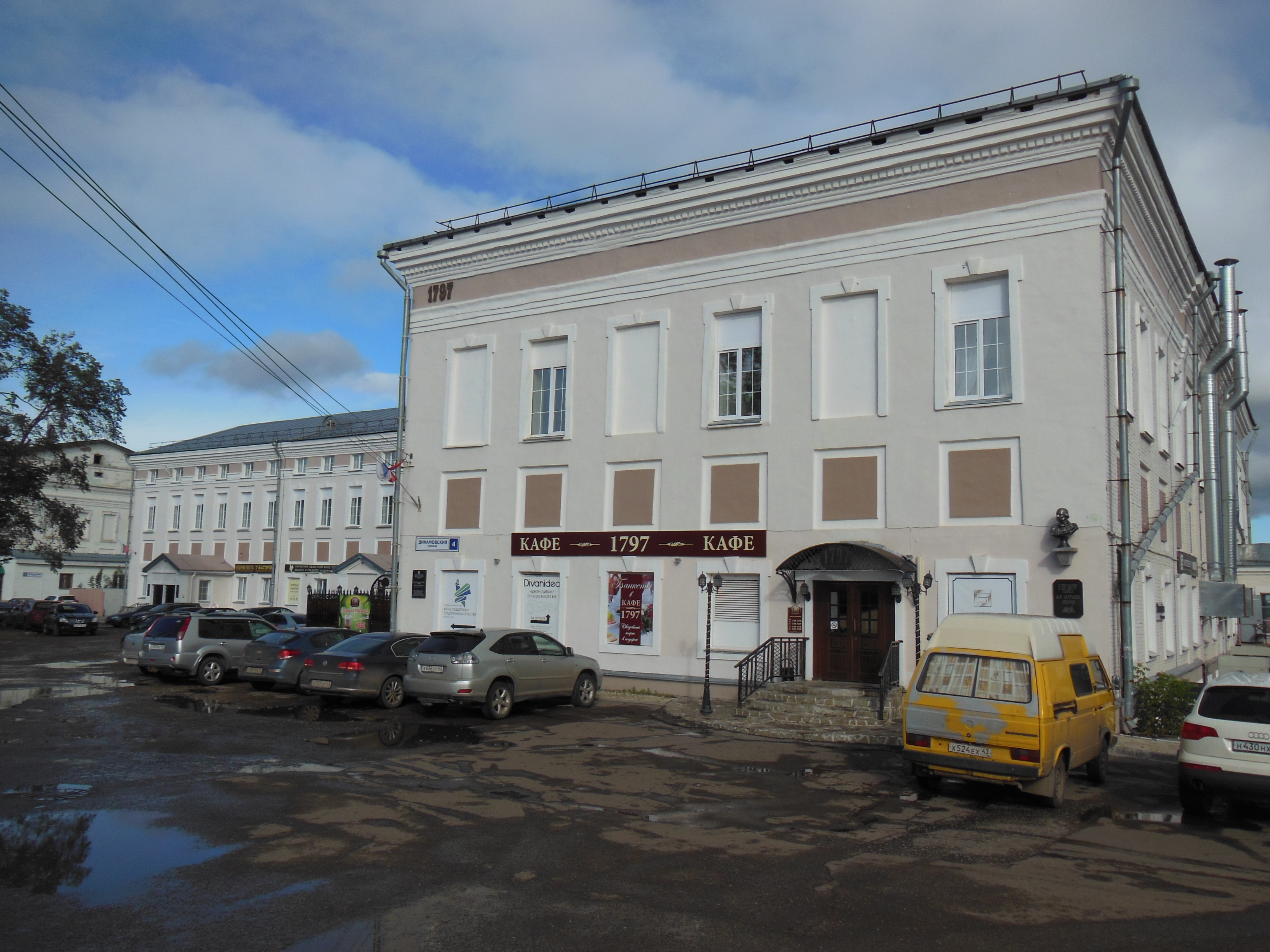 Южный корпус. Здесь работал писатель-сатирик Салтыков-Щедрин М.Е.: проезд Динамовский, 4, Киров, Кировская область